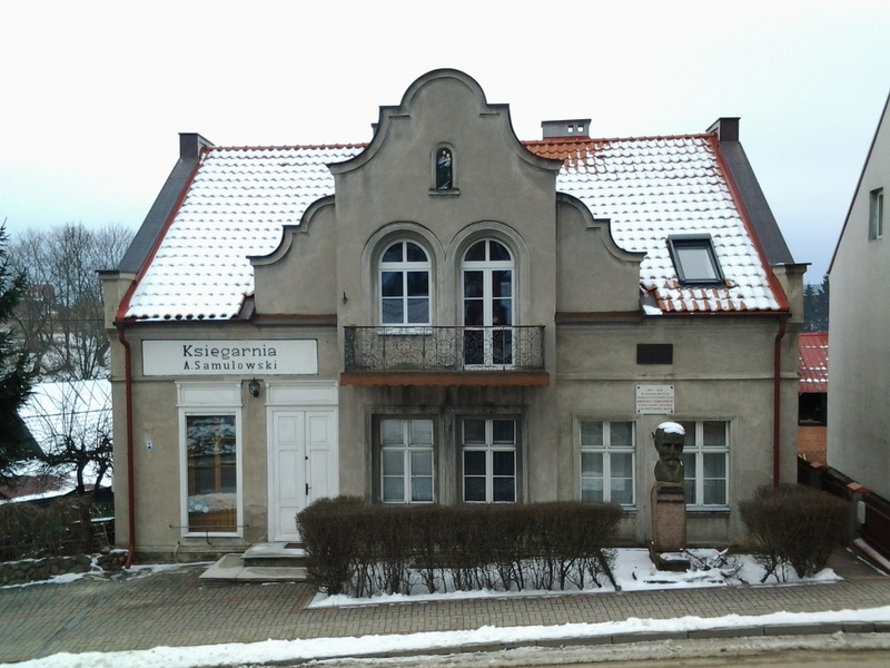 Dom Andrzeja Samulowskiego w Gietrzwałdzie.